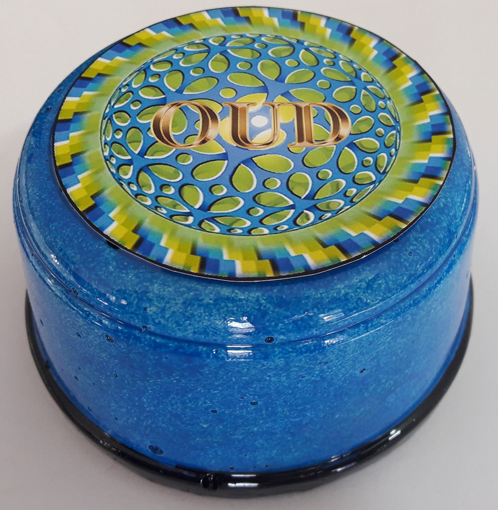 بخور بحری نوعی ماده خاص با خواص عجیب است.دود حاصل از این بخورخاصیت درمانی بسیاری دارد و باعث ترمیم بافت های عصبی بدن میشود.بخور بحری در علوم غریبه و احضار موجودات ماورائی نقش کلیدی را برعهده دارد.